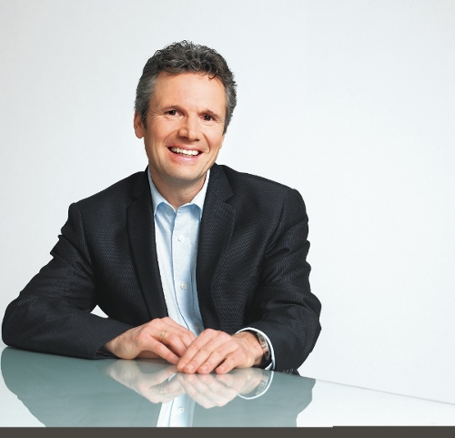 Porträt von Dr. Christoph Platzgummer